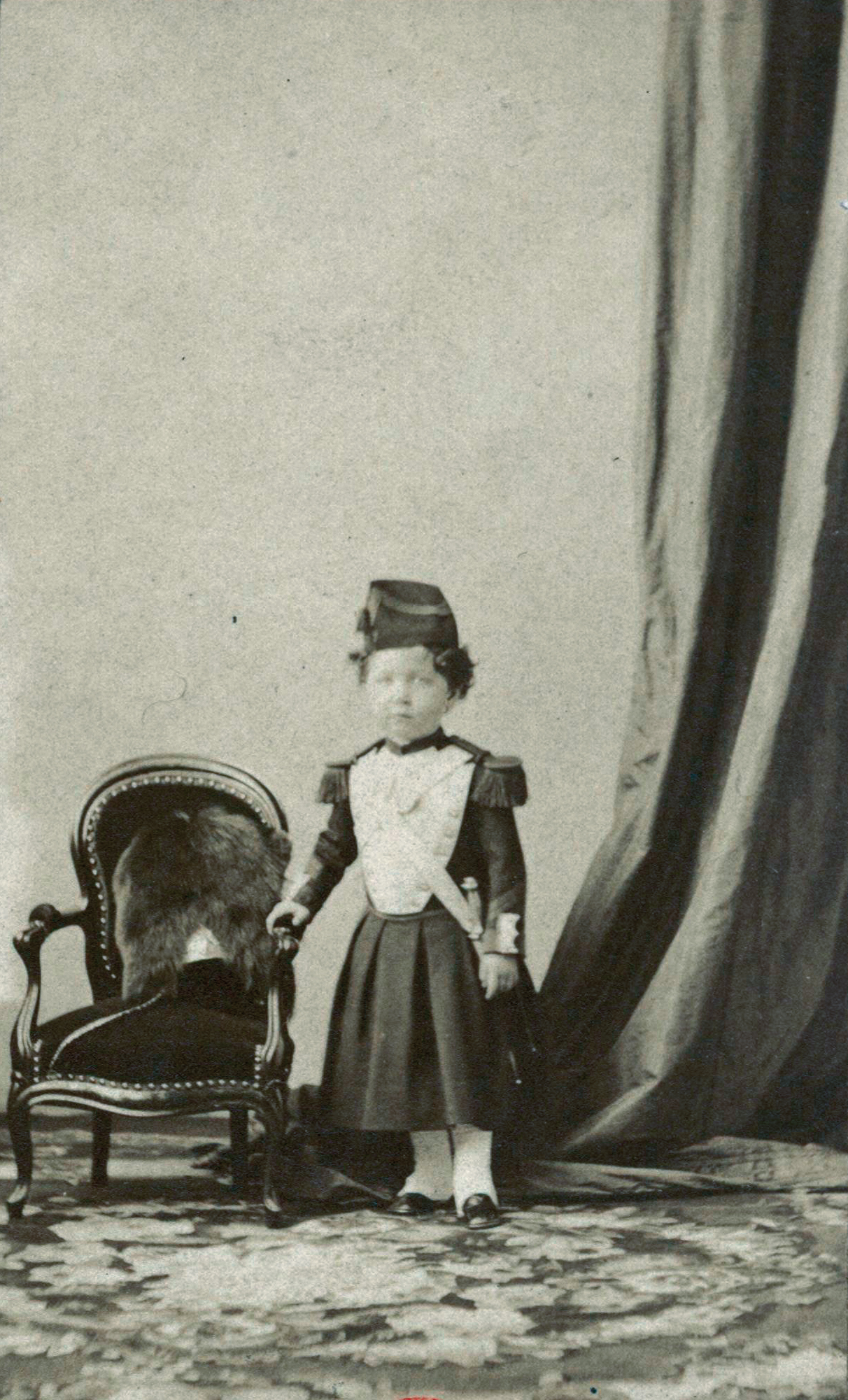 Le Prince impérial, debout, de face, avec, sur la tête, un bonnet de police avec un pompon qui retombe.